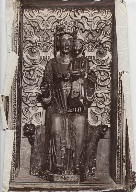 Madonna del Colle - scultura lignea